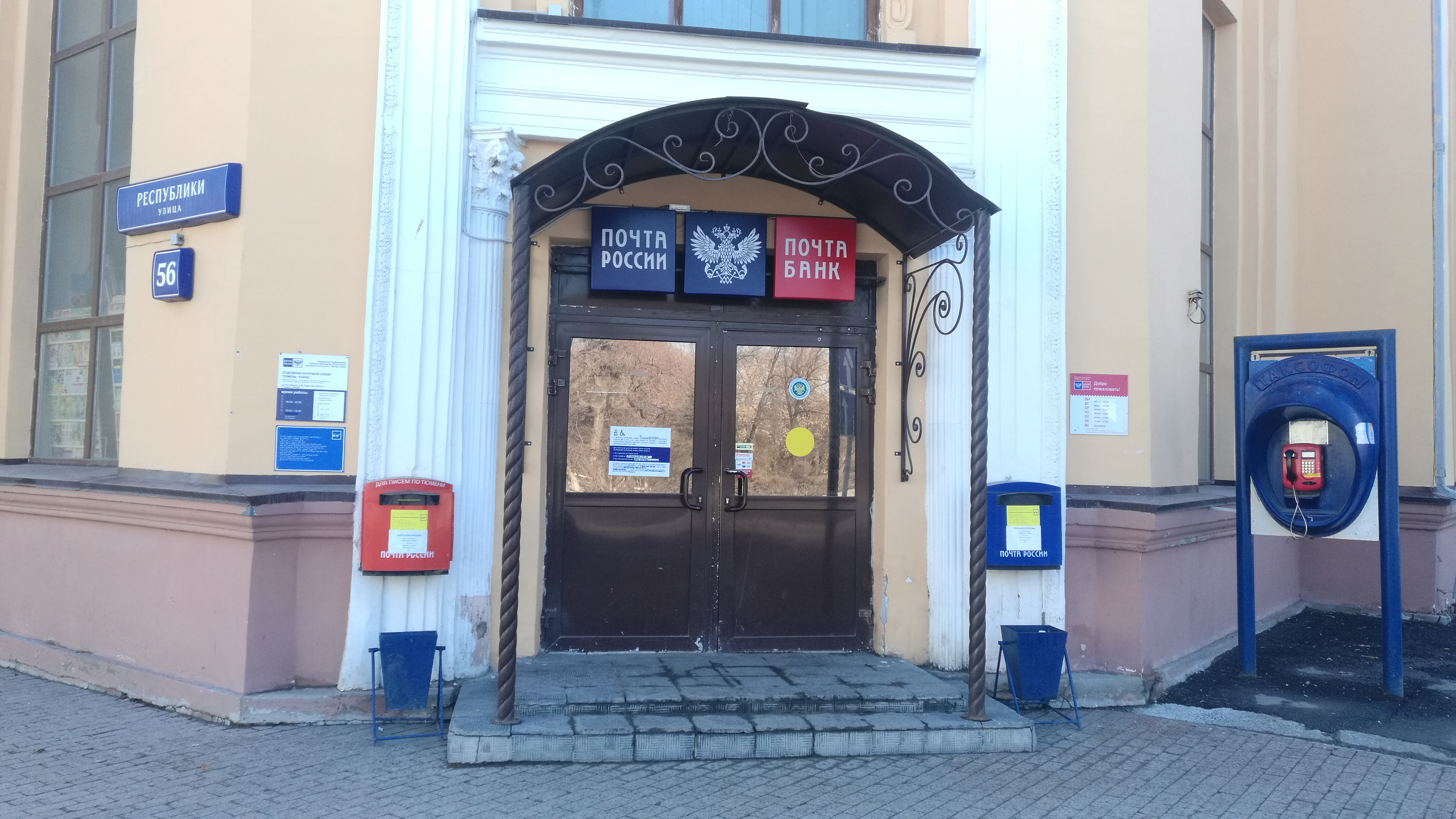 La Ĉefpoŝtejo. Tjumeno, Rusio.